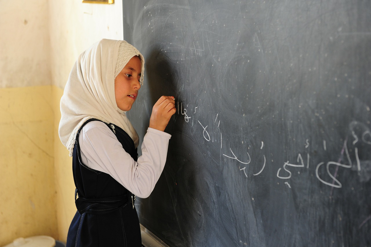 Siswi di Iran sedang menulis sesuatu di papan tulis. Gadis tersebut menggunakan kerudung putih dengan seragam hitam, dan rok biru.